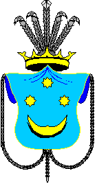 Герб Теребовлі польського періоду: герб